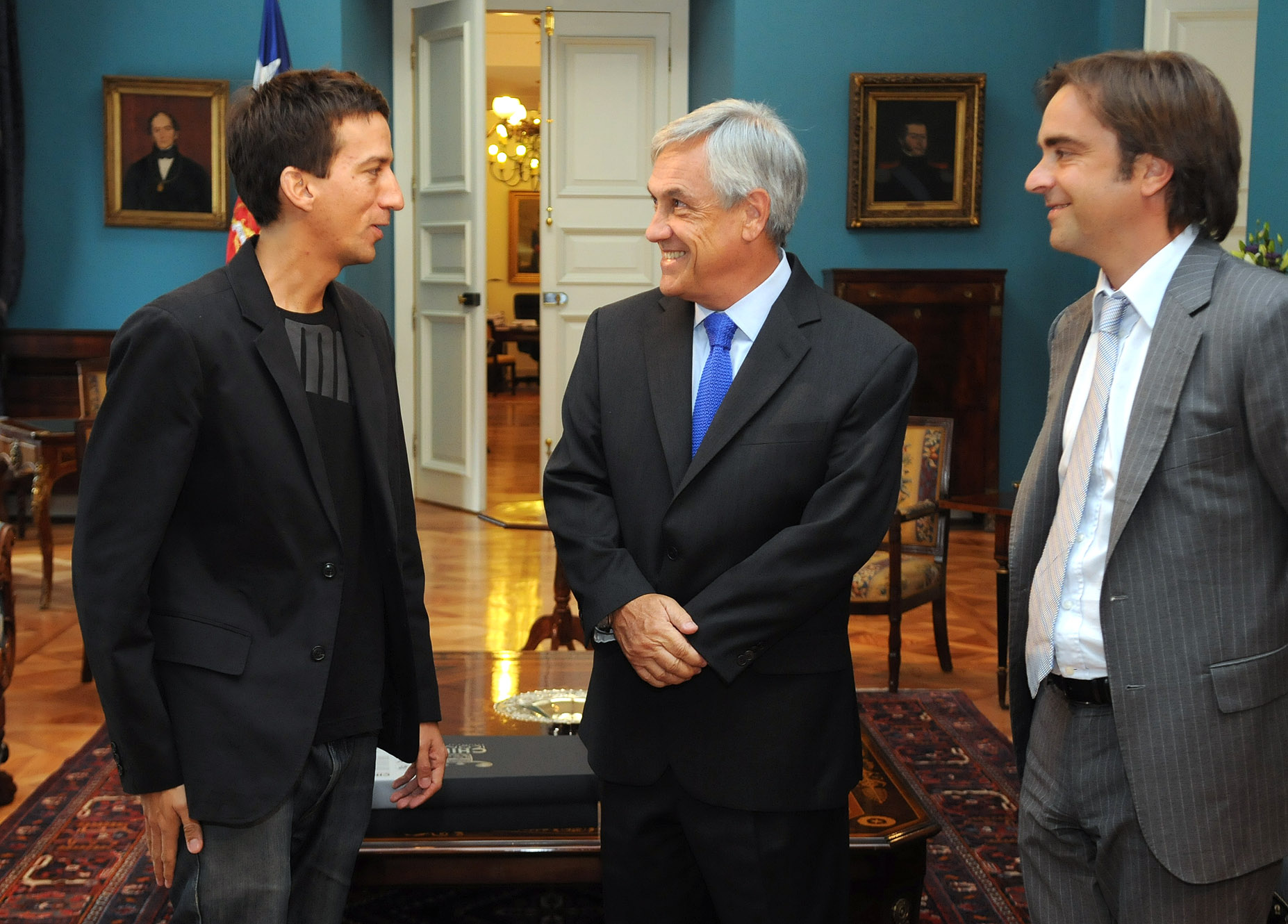 Presidente Piñera recibe al director Matías Bize por su premio Goya en España a la Mejor Película Hispanoamericana.